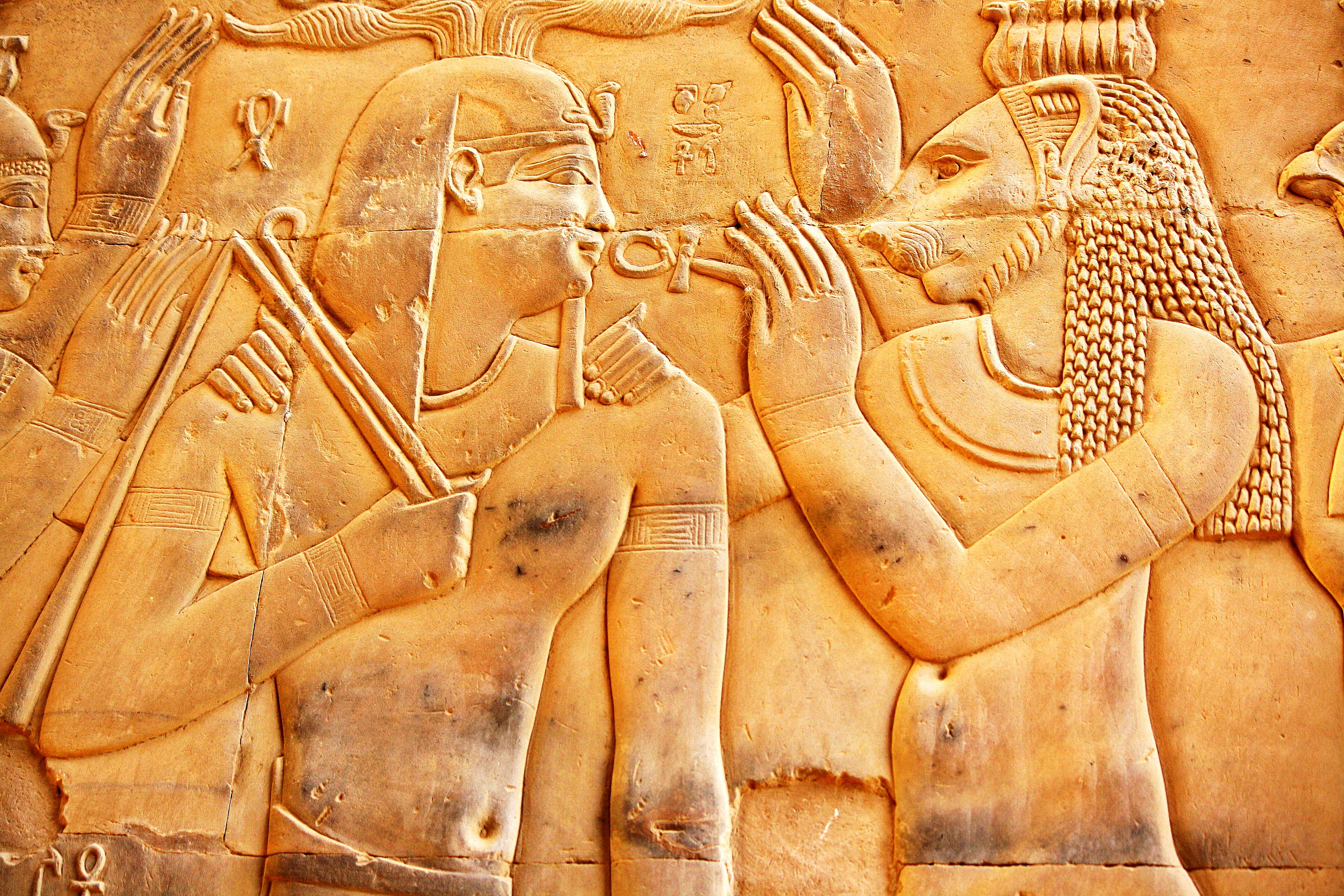 Tempel von Kom Ombo